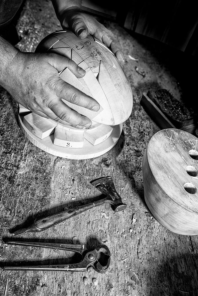 Hutmacher